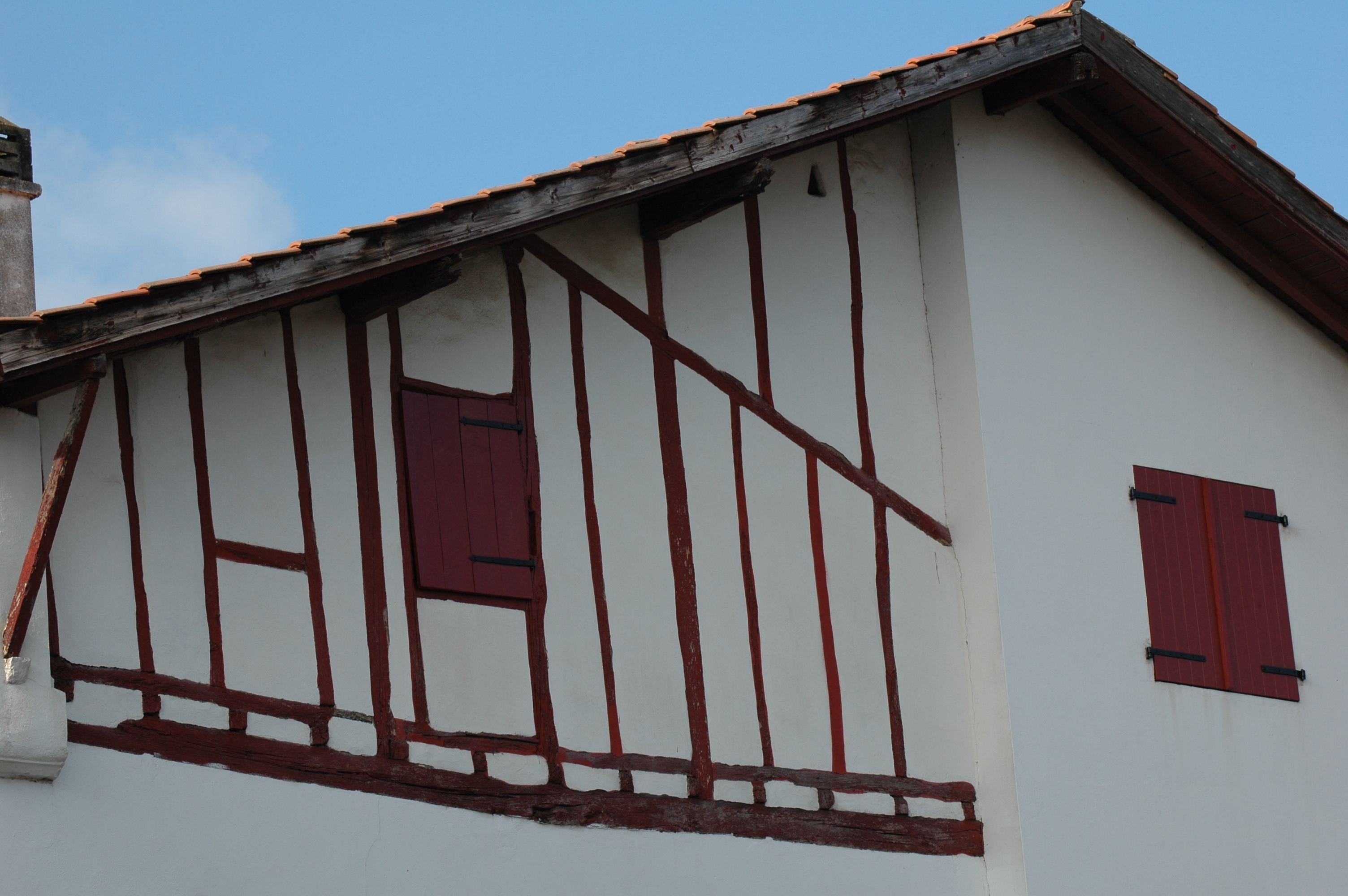 Ahetze, maison réhaussée